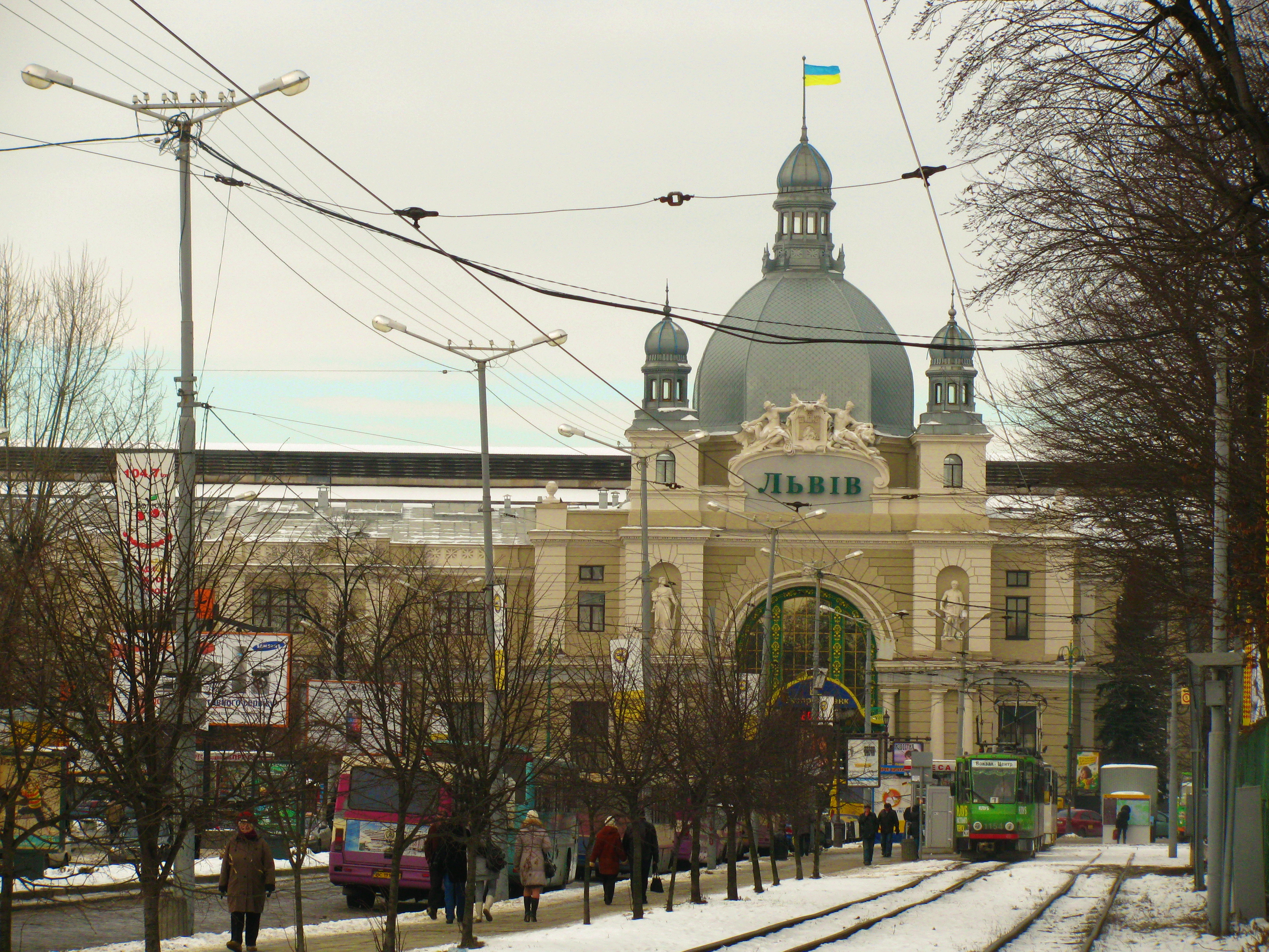 Головний залізничний вокзал здалека Львів.JPG: Головний залізничний вокзал станції Львів